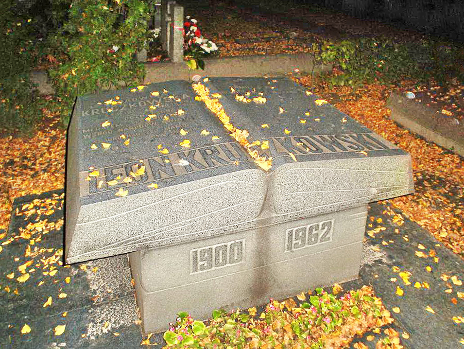 Grób Leona Kruczkowskiego na Cmentarzu Wojskowym na Powązkach